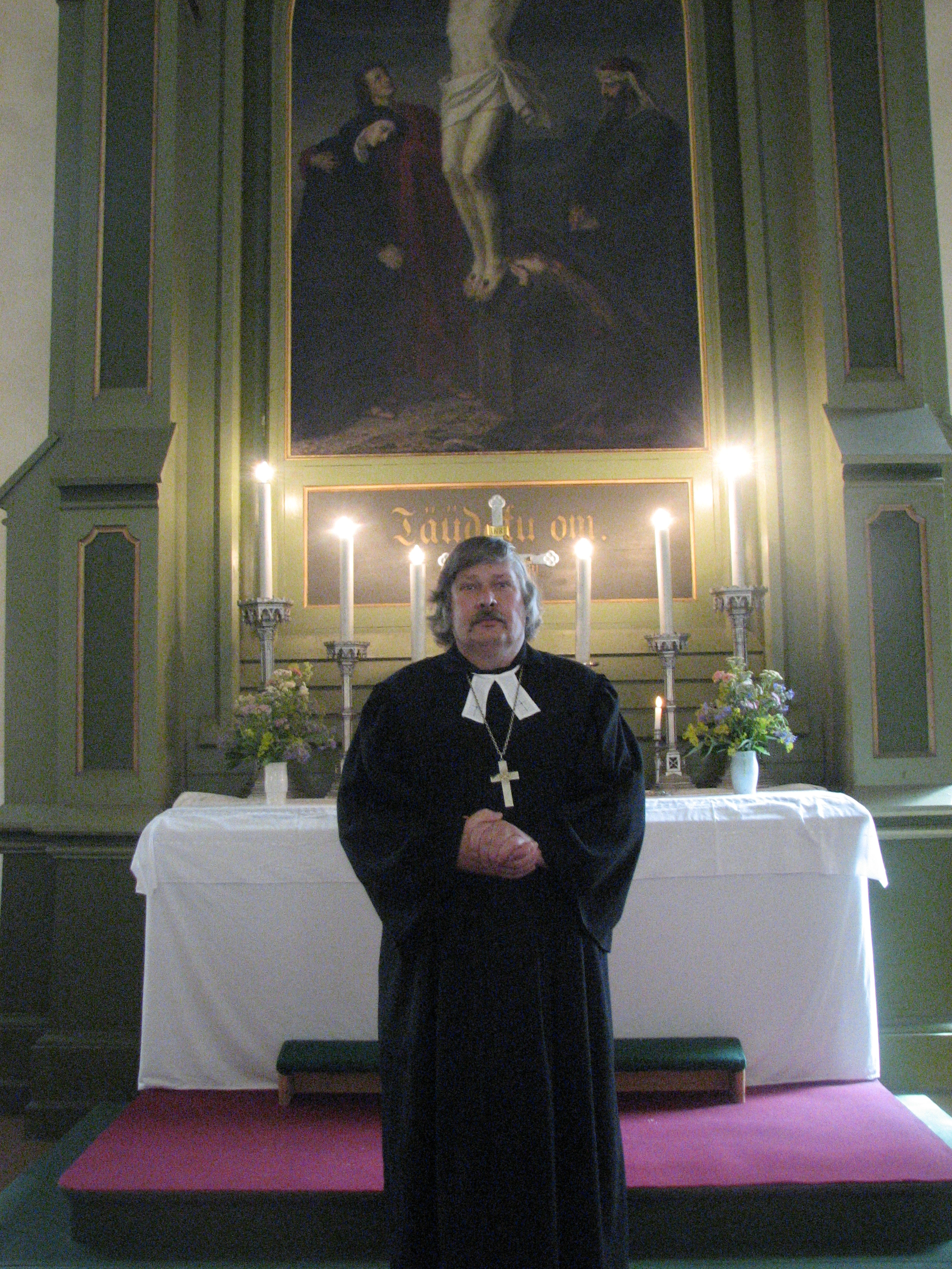 Andres Aaste